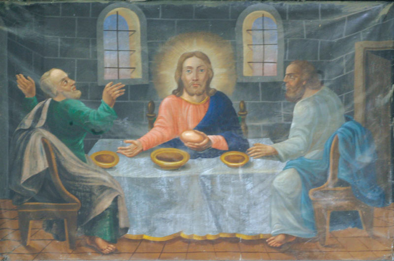 «Езус з вучнямі ў Эмаўсе». ХІХ ст., вёска Дзераўная Стаўбцоўскага р-на